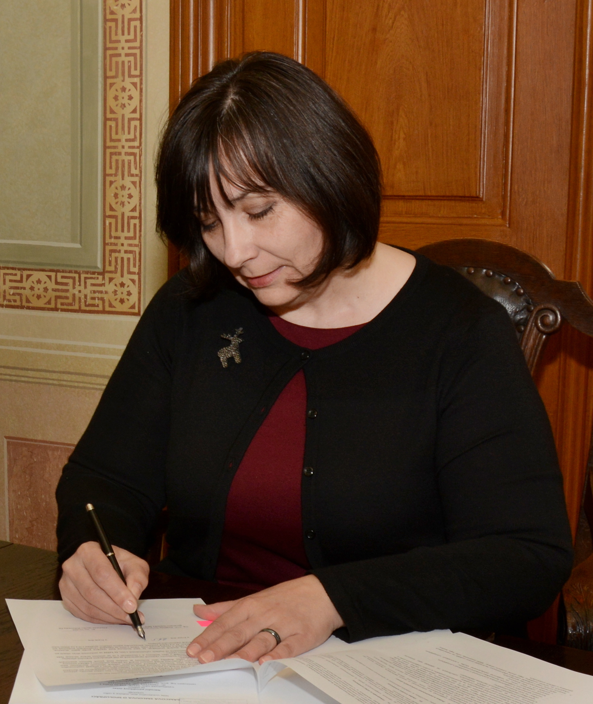 Podpis memoranda o spolupráci NPÚ a spolku Wikimedia ČR.